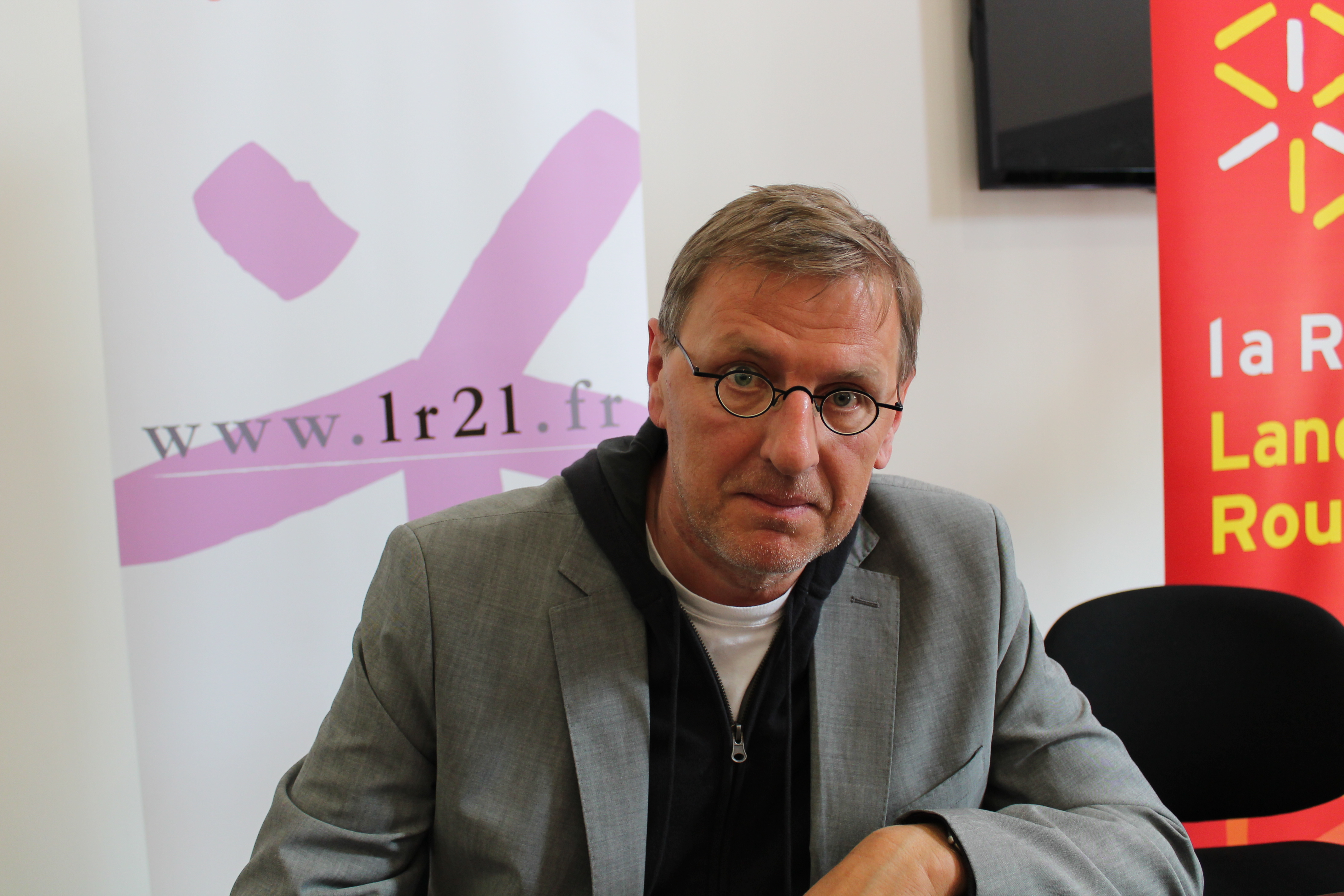 Rencontre avec Grégoire Delacourt, lauréat du prix méditerranée des lycéens, le 16 mai 2013 à Montpellier